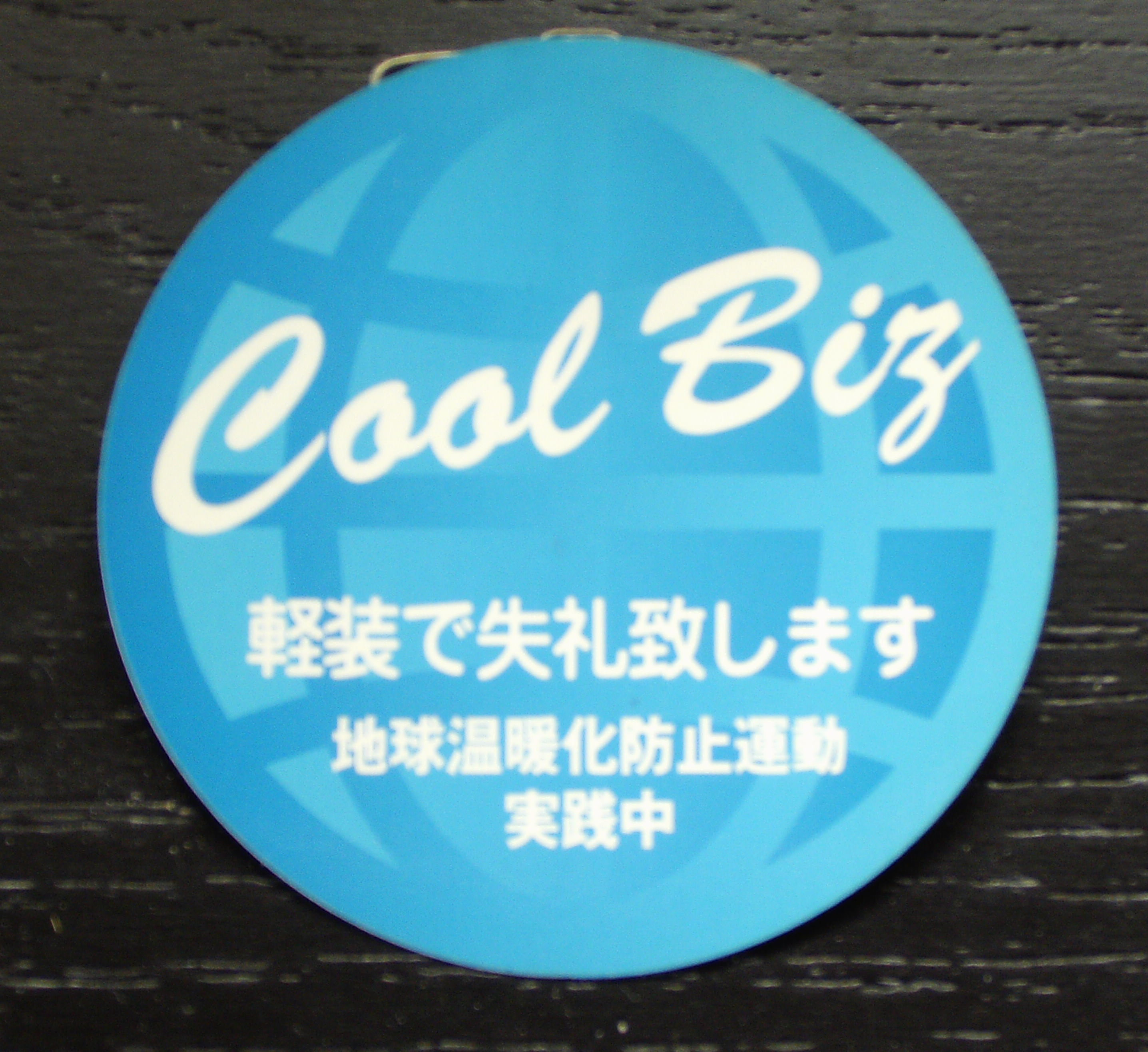 2005年のクールビズ導入の際に中央省庁等で配布されたバッジ 外部者面会の際用に「軽装で失礼します」と書かれている